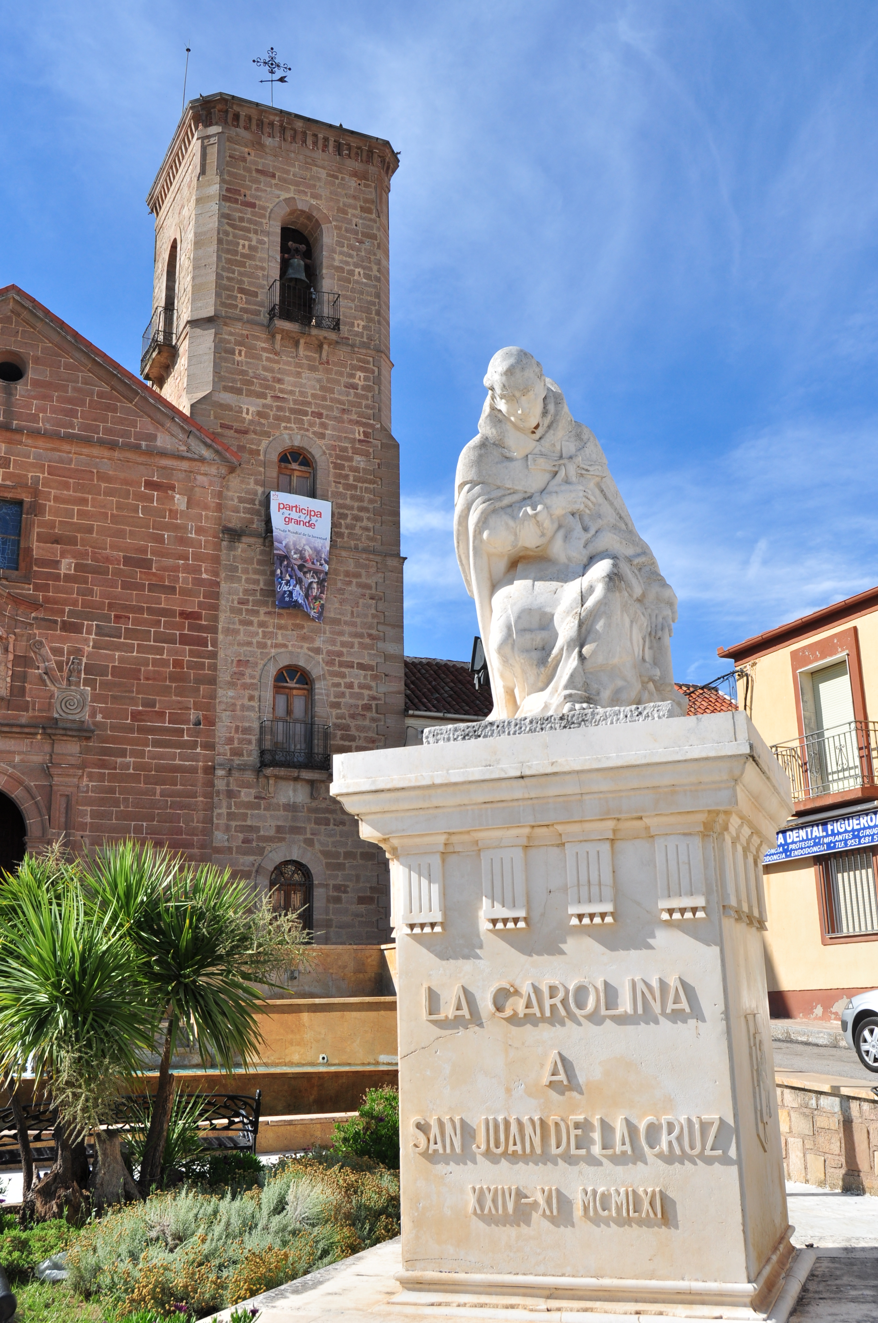 La Carolina, Spain.